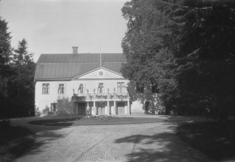 Motiv: Hovgården Kategori: Herrgård Hovgården